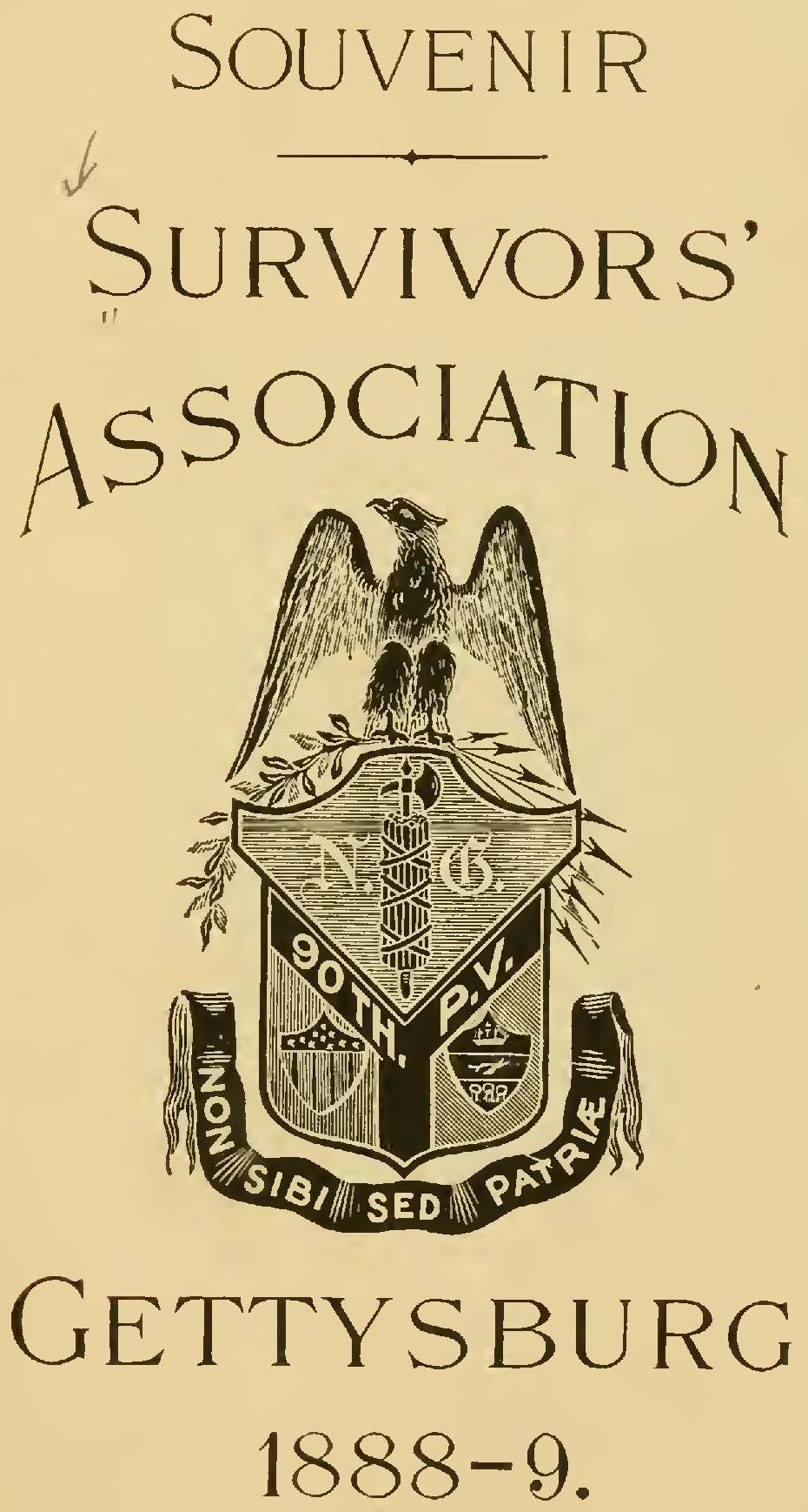 Subjects